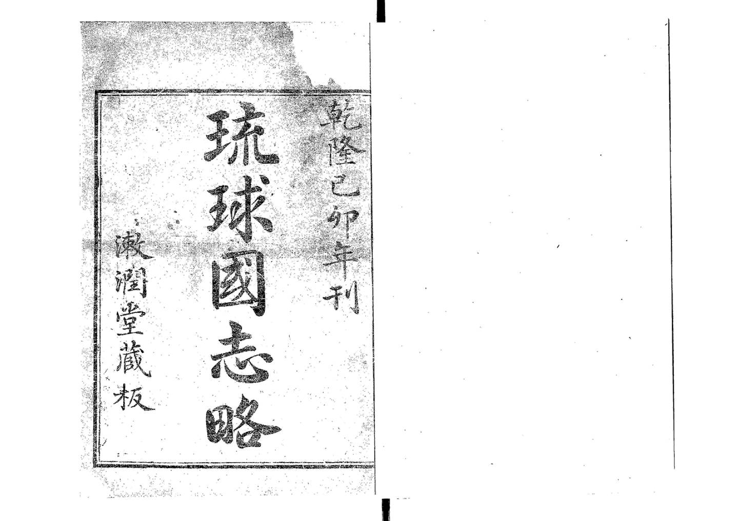 『琉球国志略（りゅうきゅうこくしりゃく）』の表紙